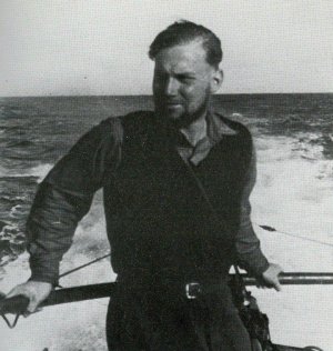 Jan Rudolf Hommes als Kriegsberichter (oorlogsverslaggever) voor de Duitse bezetter op een Duitse U-boot (onderzeeër).